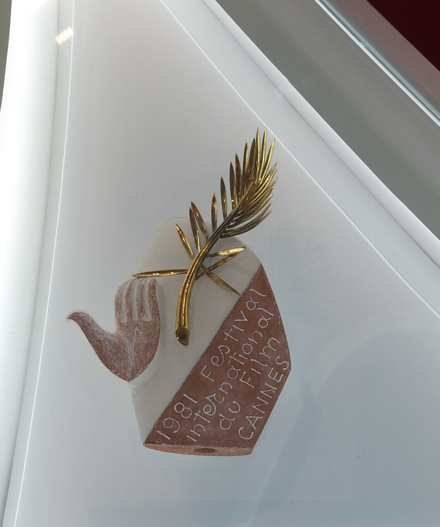 Złota Palma przyznana Andrzejowi Wajdzie za Człowieka z żelaza (1981).